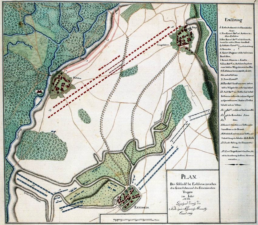 Originaltitel: Plan der Schlacht bei Entzheim zwischen den Kaiserlichen und den Französischen Truppen im Jahr 1674 (zeitgenössische Handzeichnung)